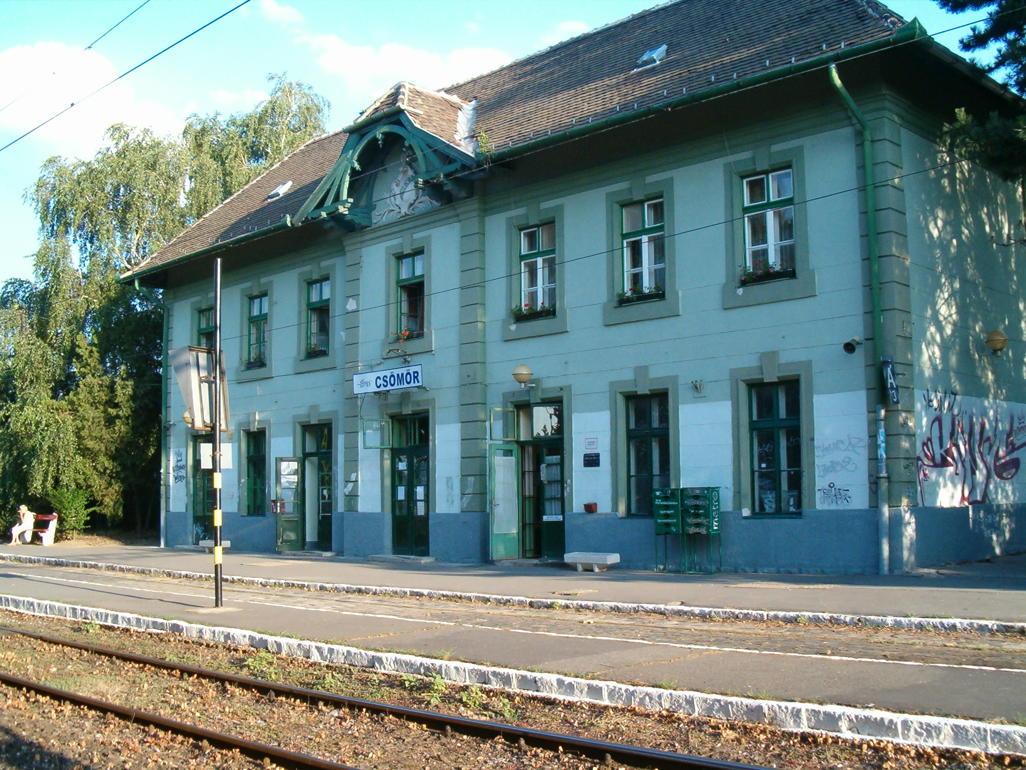 Csömör, HÉV állomás